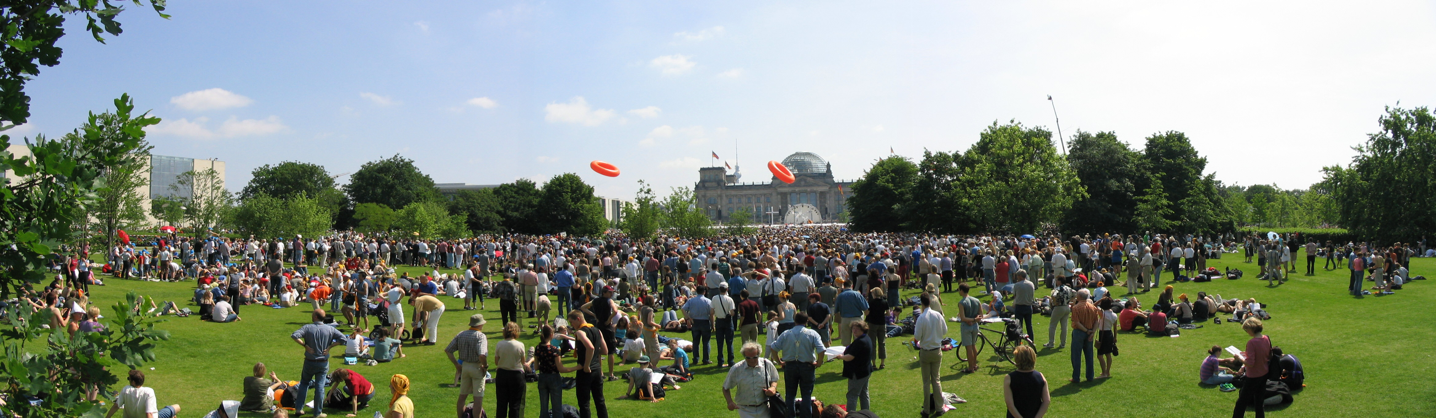 Abschlussgottesdienst des Ökumenischen Kirchentags 2003 vor dem Reichstag in Berlin